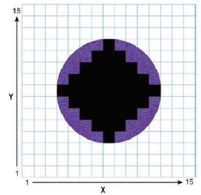 Lihtne vektor ja raster kujutise näide